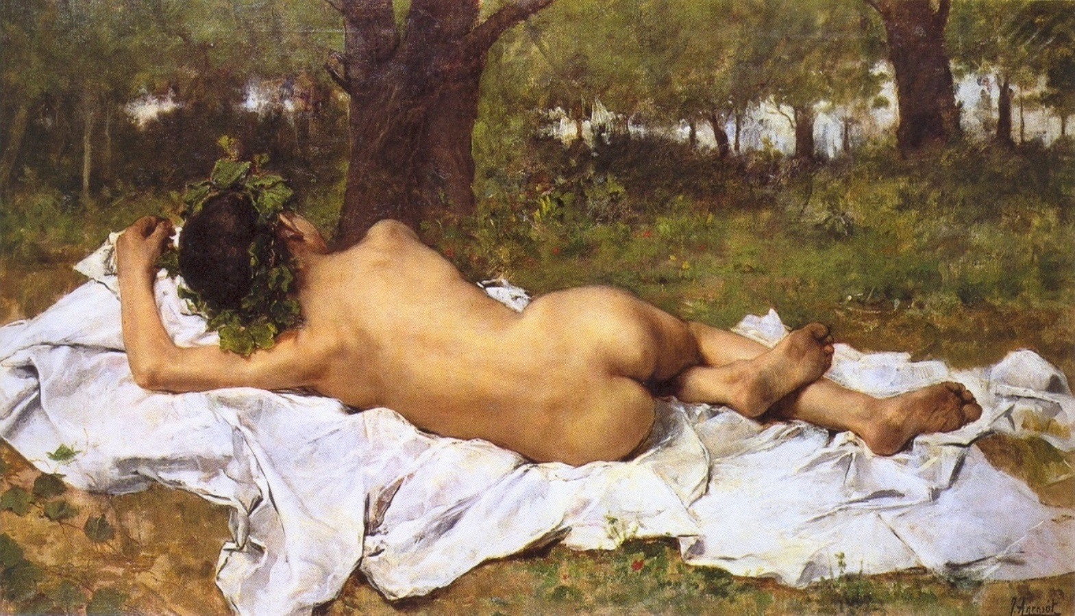 La obra representa al joven dios Baco.